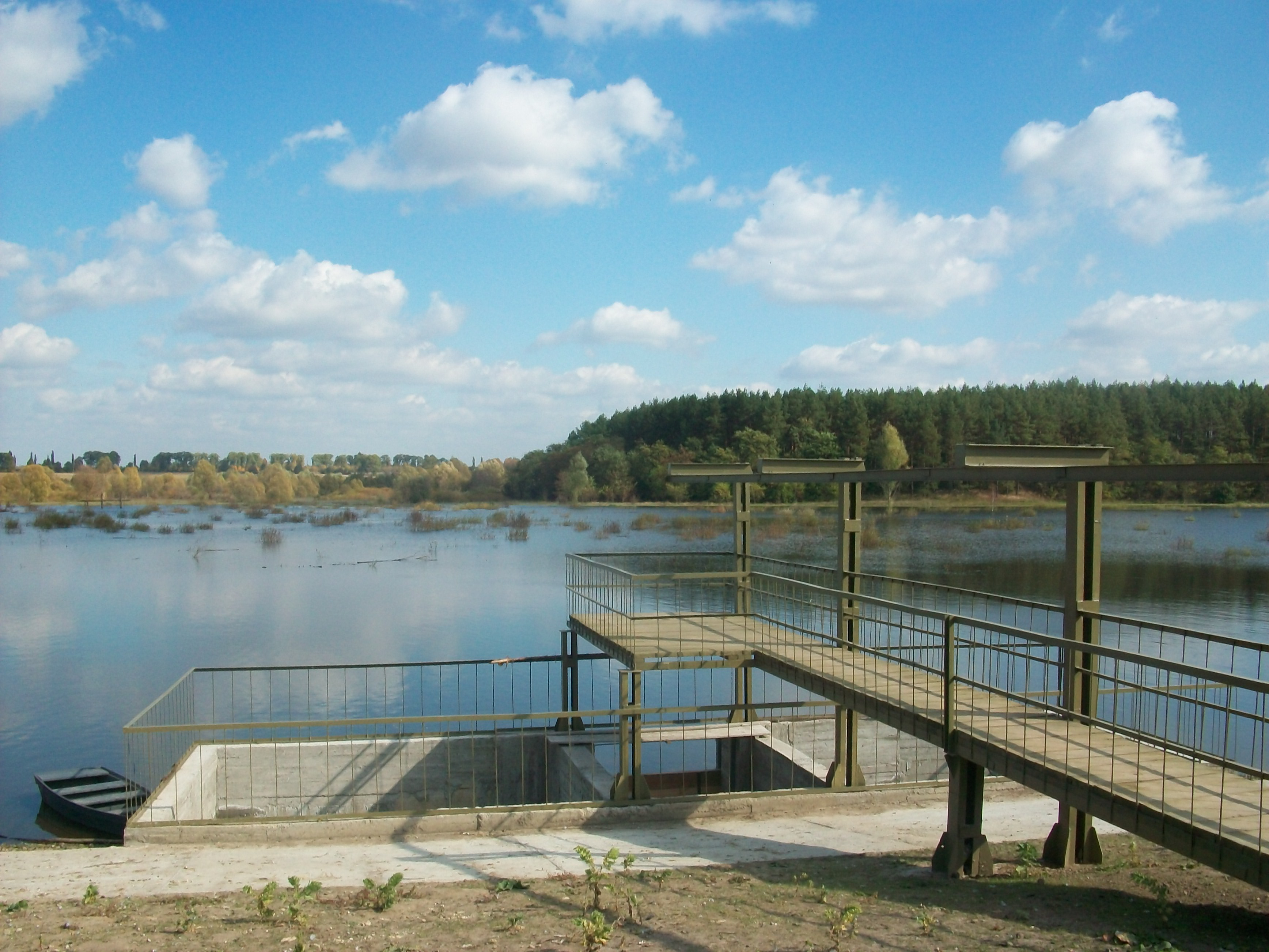 Яструбщина. Озеро